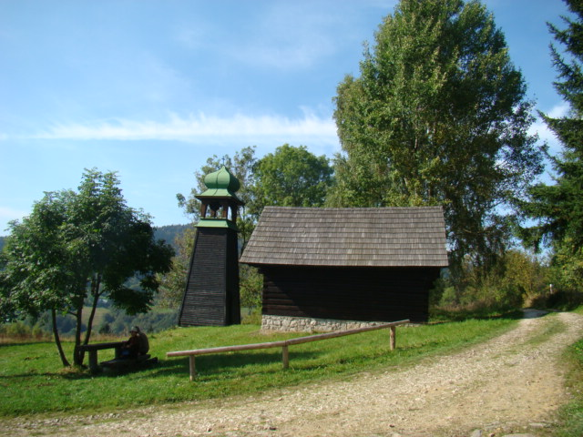 Zvonice na Přední Labské - ve Volském Dole.